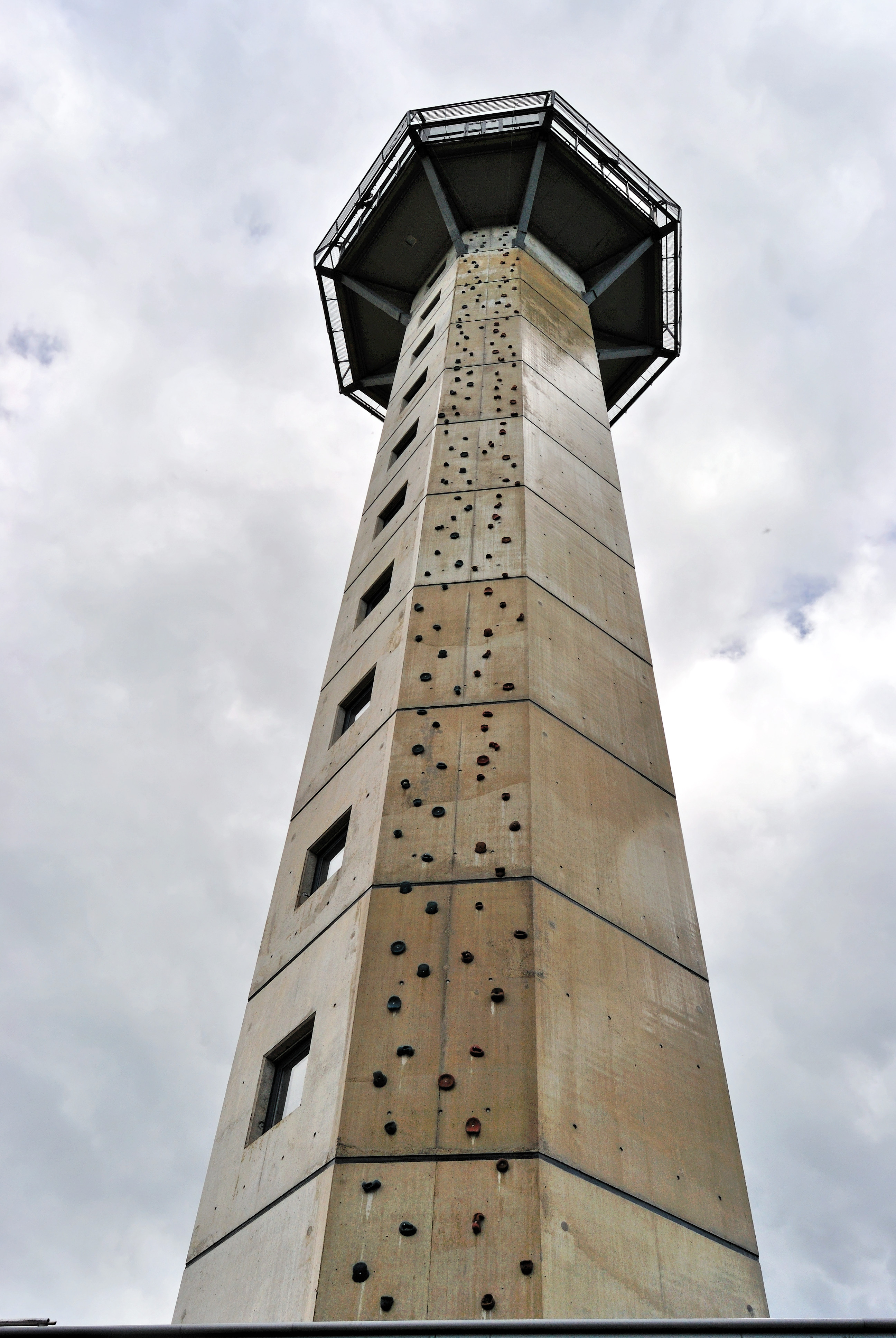 Hochheideturm in Willingen (Upland) auf dem Ettelsberg